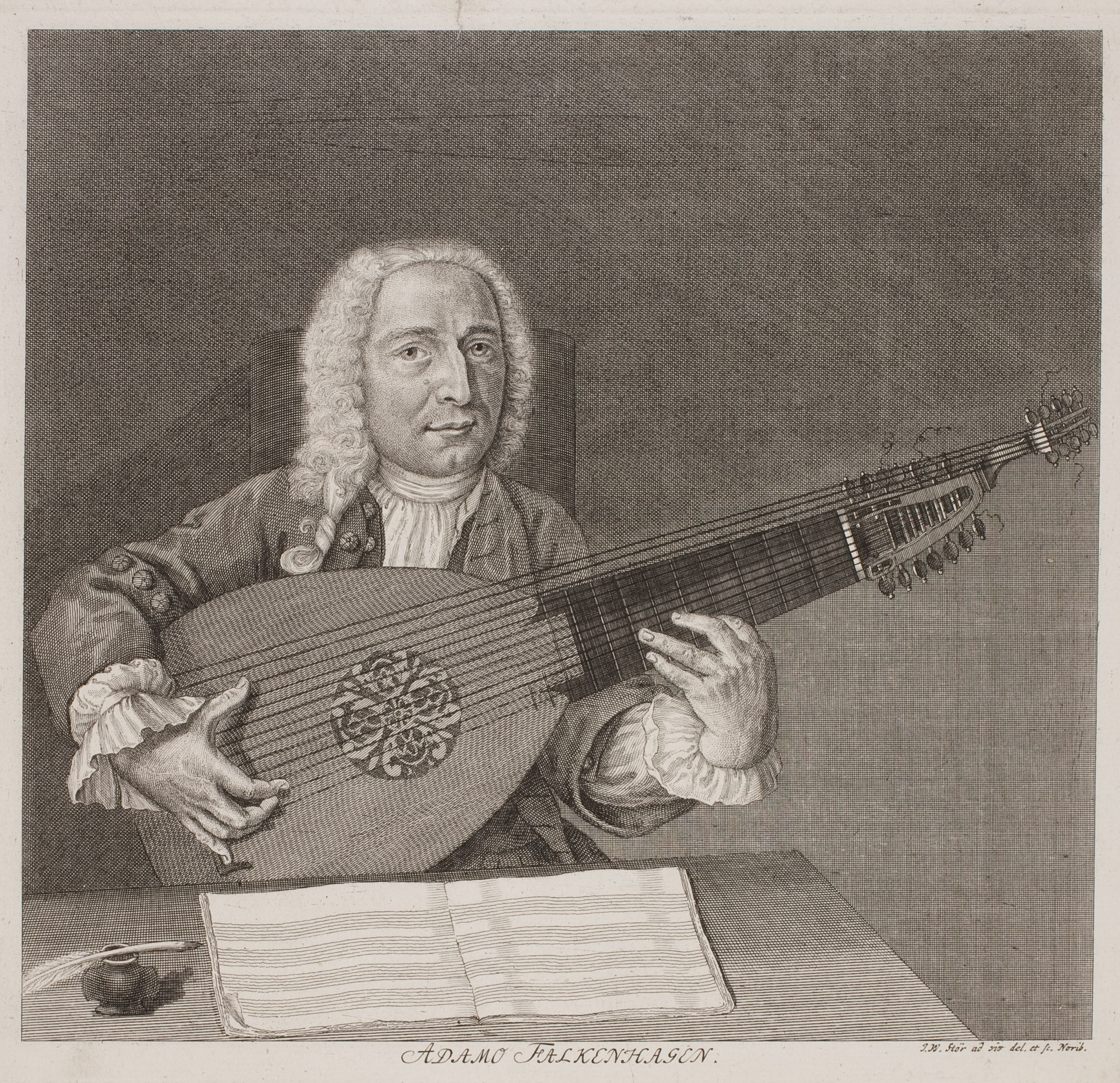 Bildnis Adam Falkenhagen